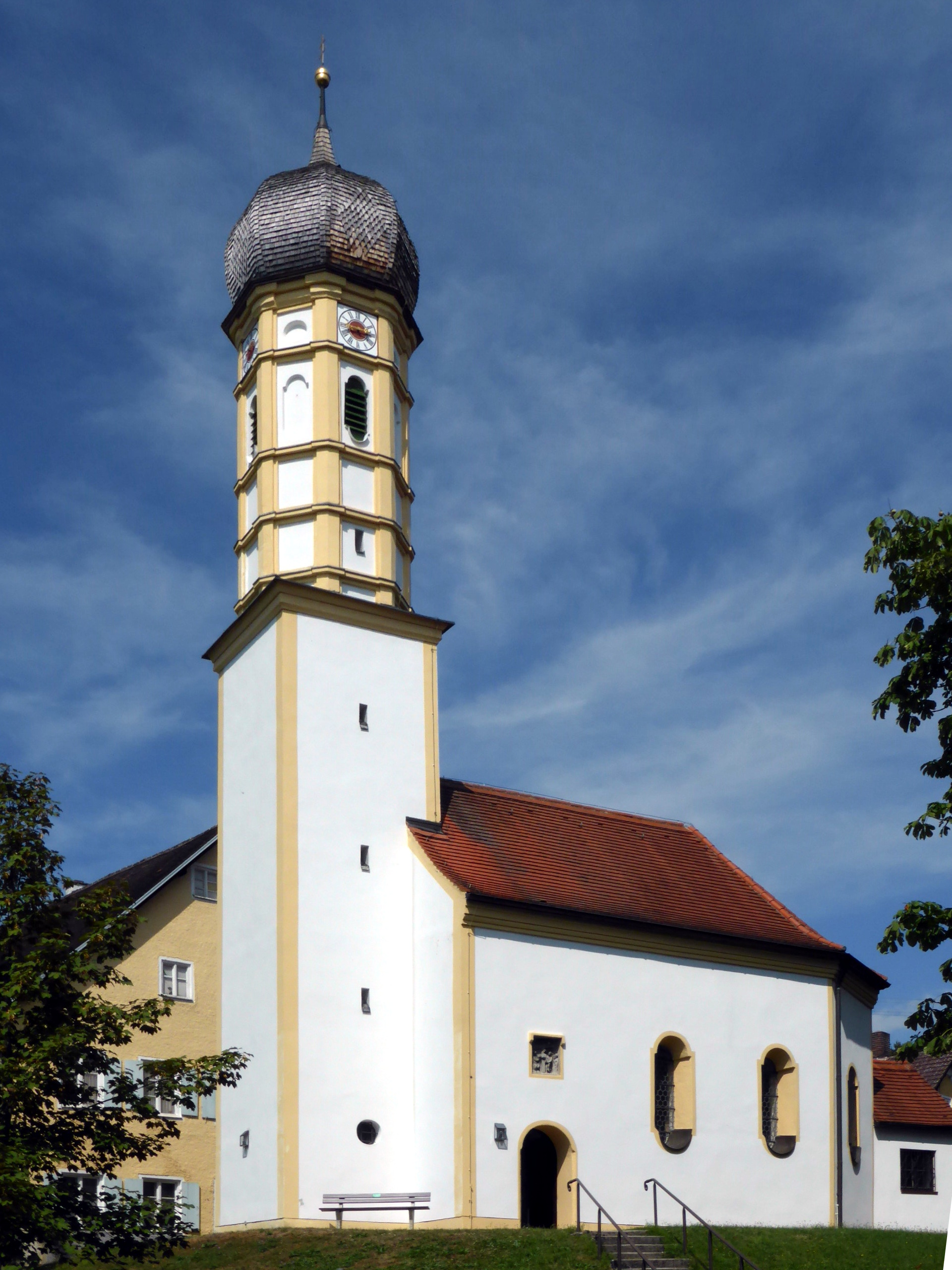 Kirche Sankt Peter und Paul in Nannhofen.